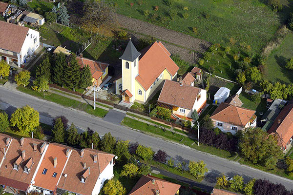 Emőd légi fotó